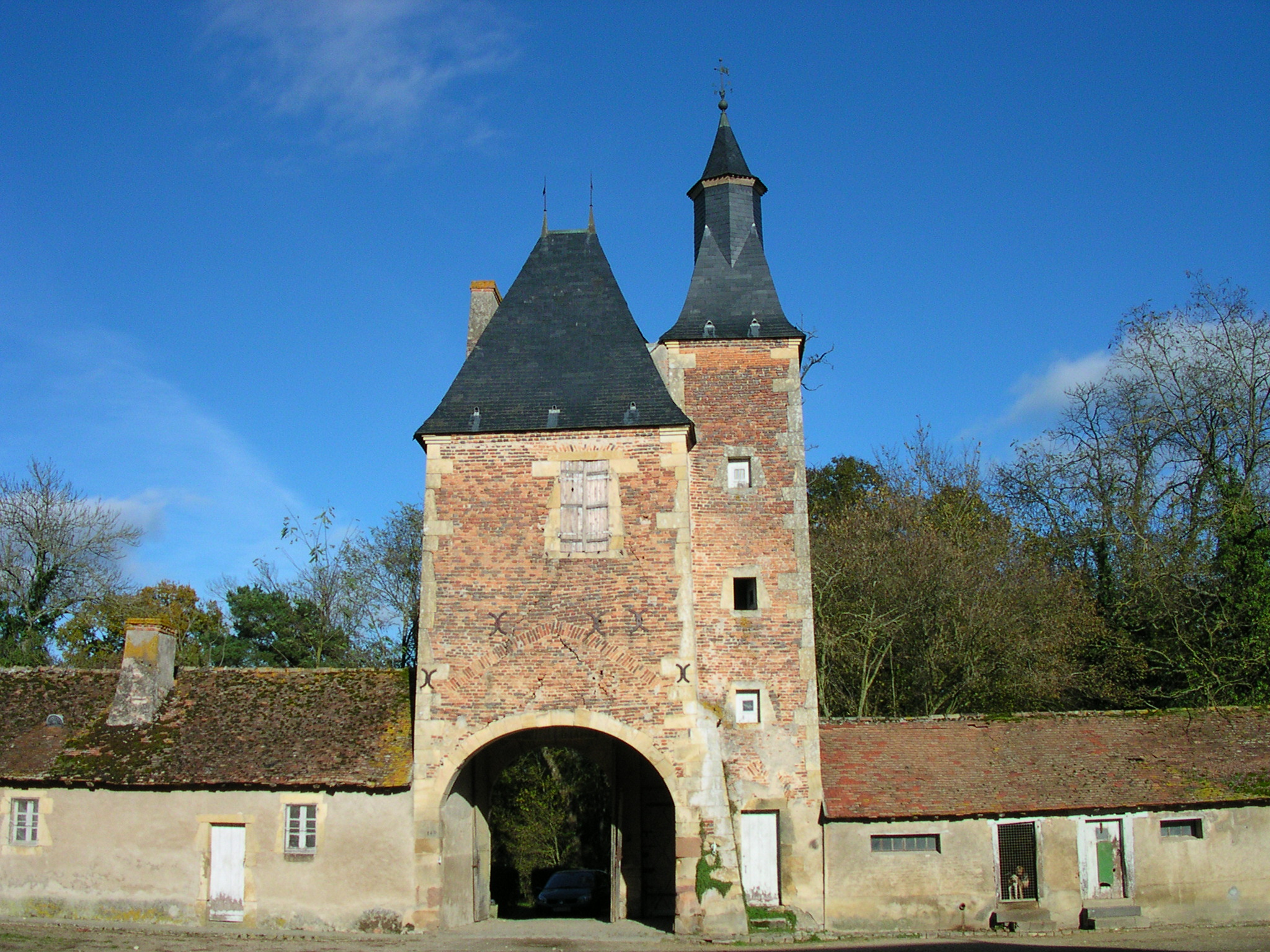 L'entrée du château de la Cour à Chapeau, vue de l'intérieure